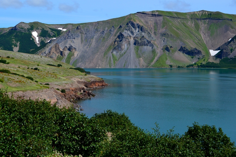 Кальдера вулкана «Ксудач», Елизовский район This image is related to the protected area of Russia number 4110028